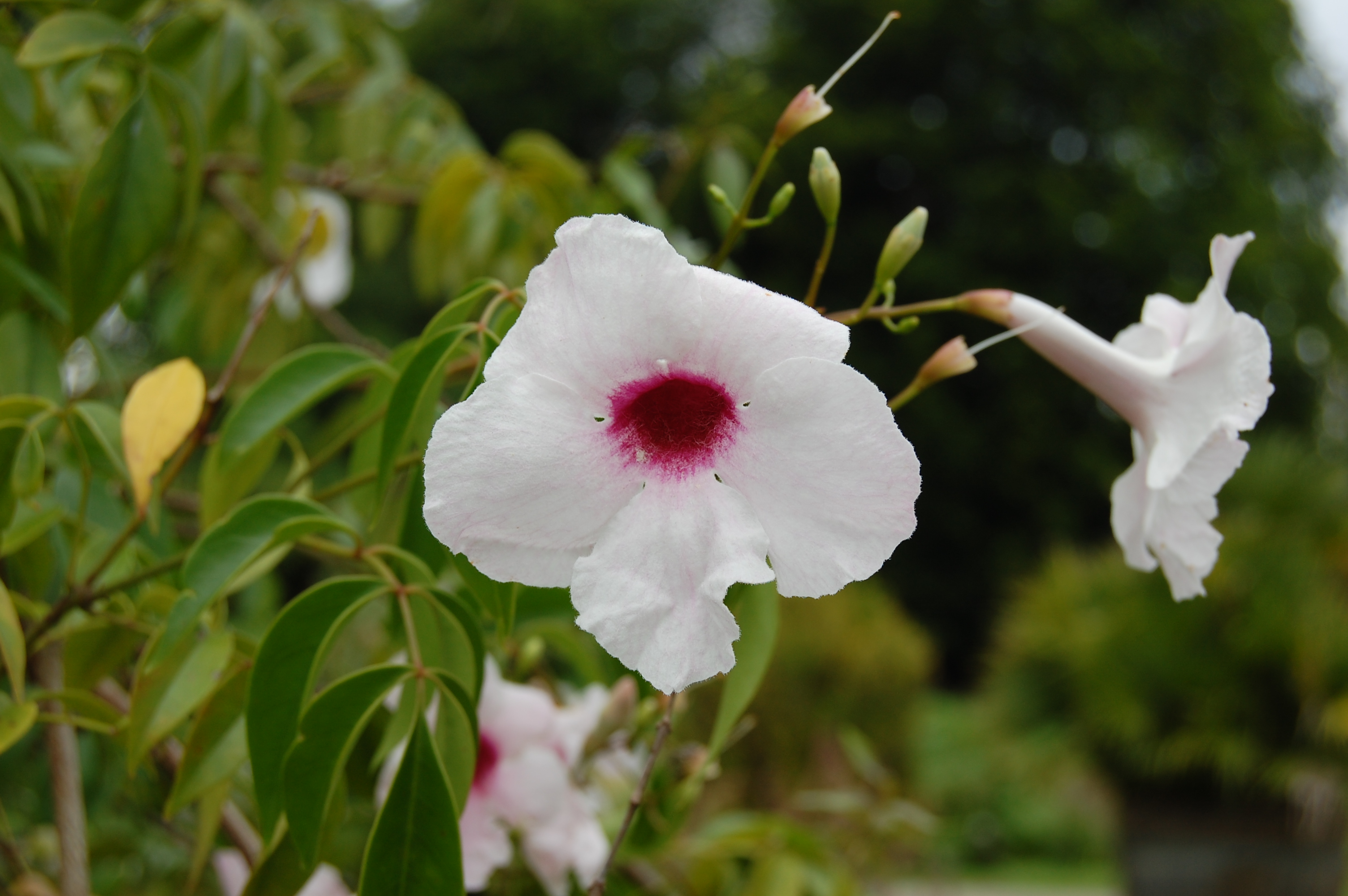 Pandorea jasminoides